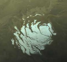 Südliche Polarkappe des Mars. Anmerkungen: schwarze Bereiche entfernt.